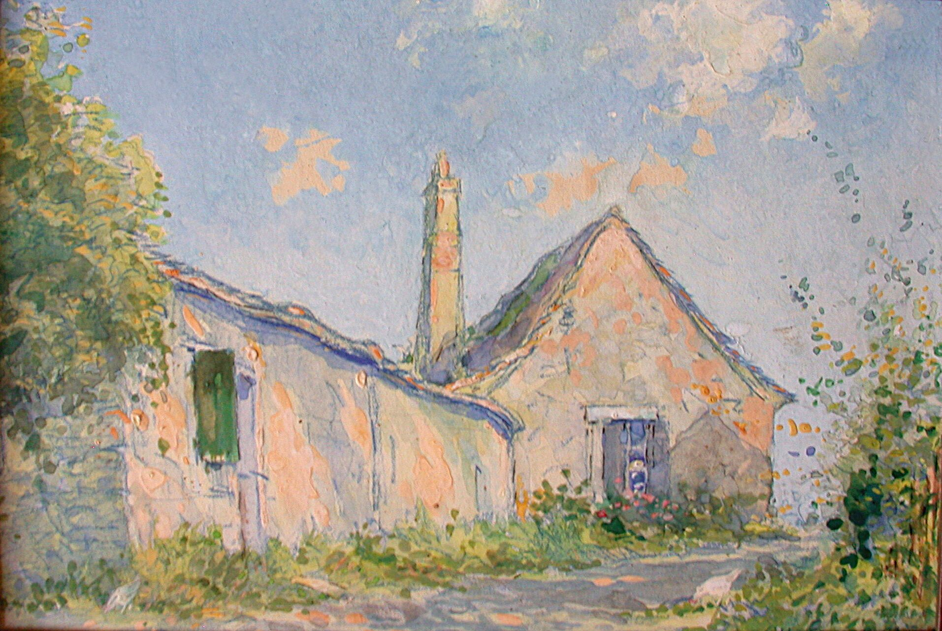 La Cleyde, Périgord, Fournery